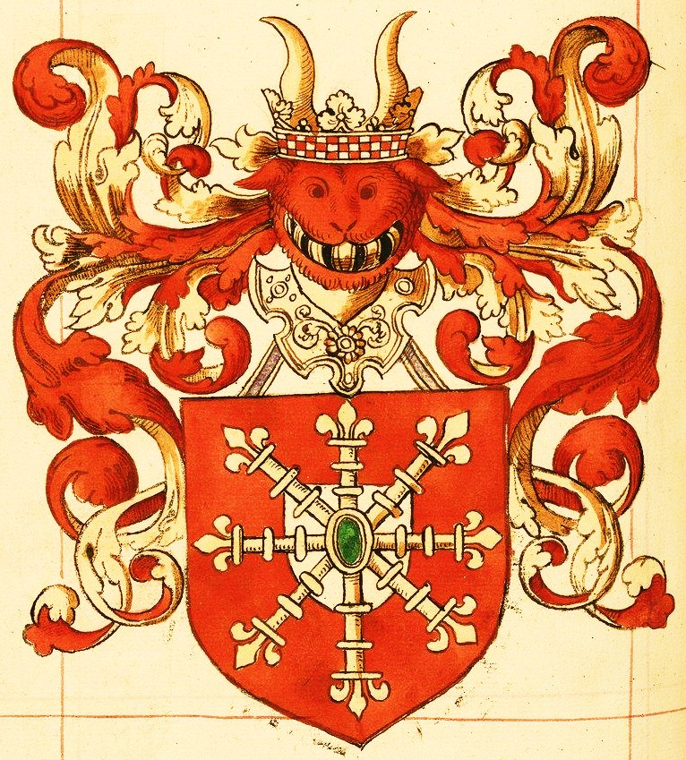 Stammwappen der Grafen von Kleve (mit dem Detailfehler, dass die Krone des Stieres bereits den märkischen Schachbalken aufweist, was anachronistisch ist, denn die späteren Grafen und Herzöge von Kleve waren des Stammes von der Mark -aber die Grafen von der Mark hatten eben den Schachbalken als Stammwappen).